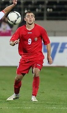 Анатолий Кептине в игре за Молодёжную Сборную Республики Молдова